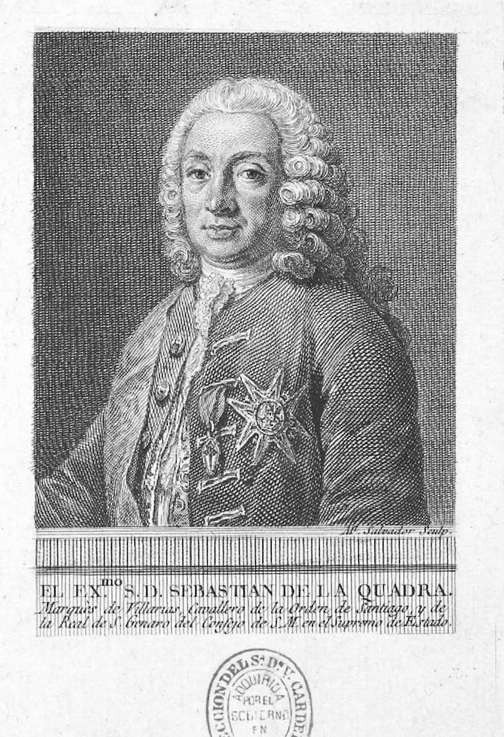 Retrato de Sebastián de la Quadra, grabado a buril de Manuel Salvador Carmona. Inscripción: EL EXmo. S. D. SEBASTIAN DE LA QUADRA. / Marqués de Villarias, Cavallero de la Orden de Santiago, y de / la Real de S. Genaro del Consejo de S. M. en el Supremo de Estado. Biblioteca Nacional de España